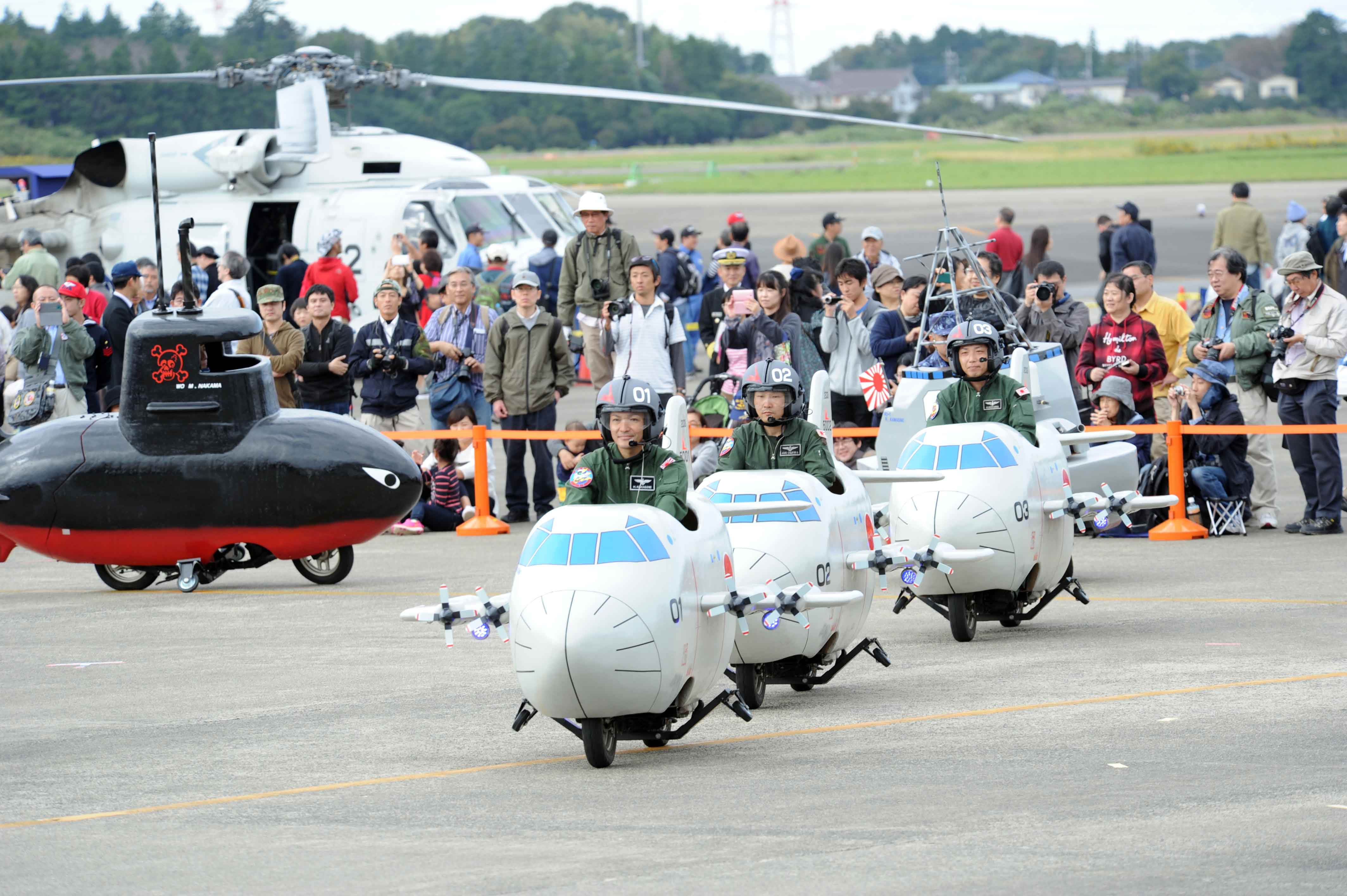 平成２８年１０月２９日（土）に「海上自衛隊 下総航空基地 開設５７周年記念行事」を開催しました。 当日は記念式典、観閲行進、P-3C体験搭乗、花電車、ミニP-3C公演、横須賀音楽隊、高野太鼓等各種イベントを実施しました。来年も皆様のご来場を隊員一同心よりお待ちしております。